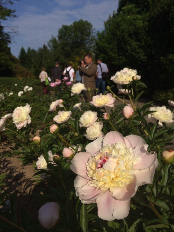 Ogród Botaniczny Uniwersytetu Marii Curie-Skłodowskiej w Lublinie, 2015